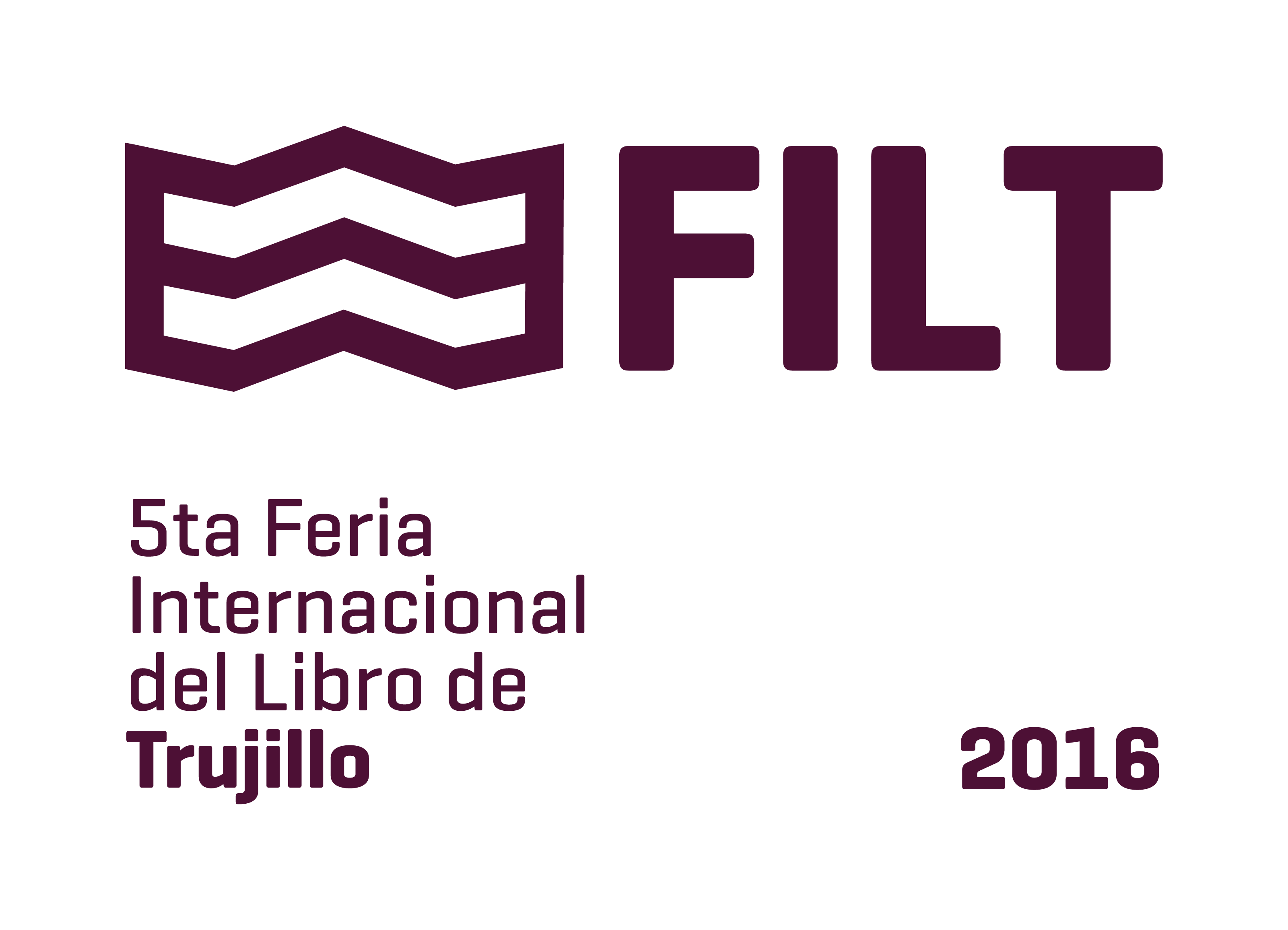 V Feria Internacional del Libro de Trujillo